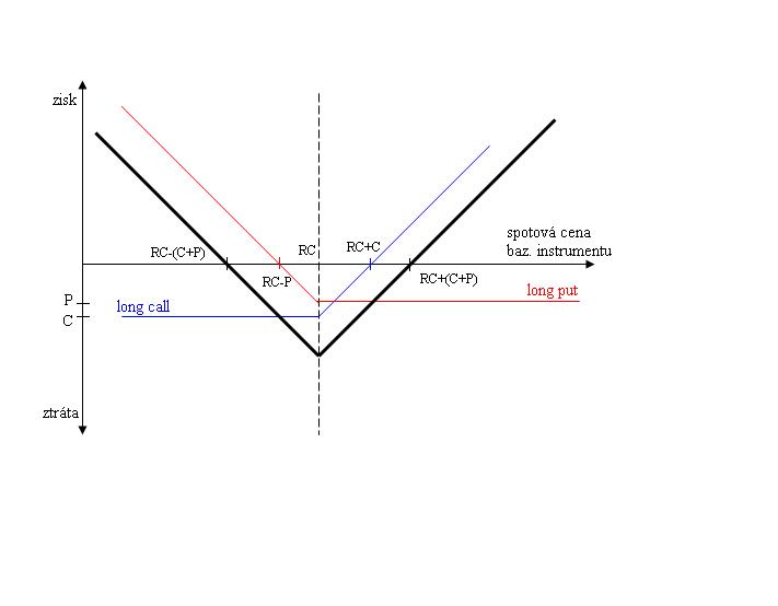 Česky: LONG STRADDLE